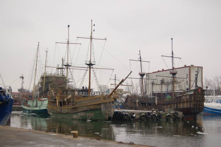 Port w Ustce